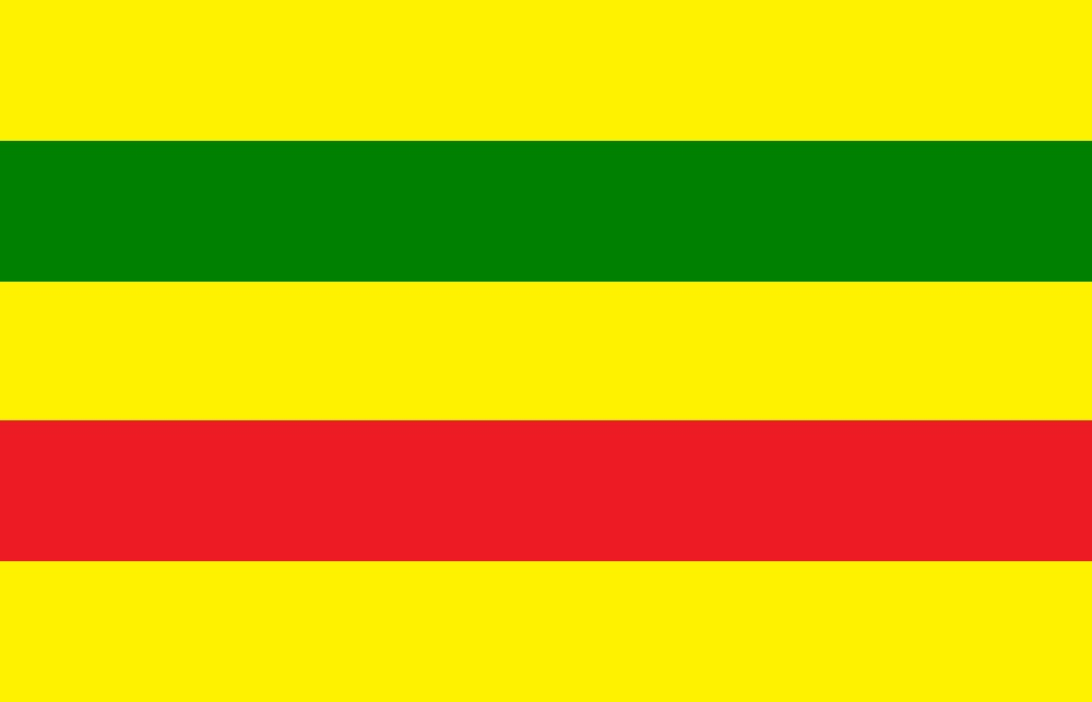 Bandera del cantón Zaruma, provincia de El Oron - Ecuador